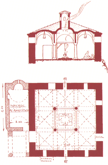 Монастир Святого Варлаама - Лікарня